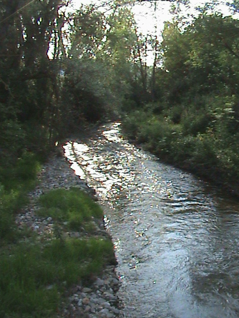 Río Oca a su paso por la localidad burgalesa de Villalbos.